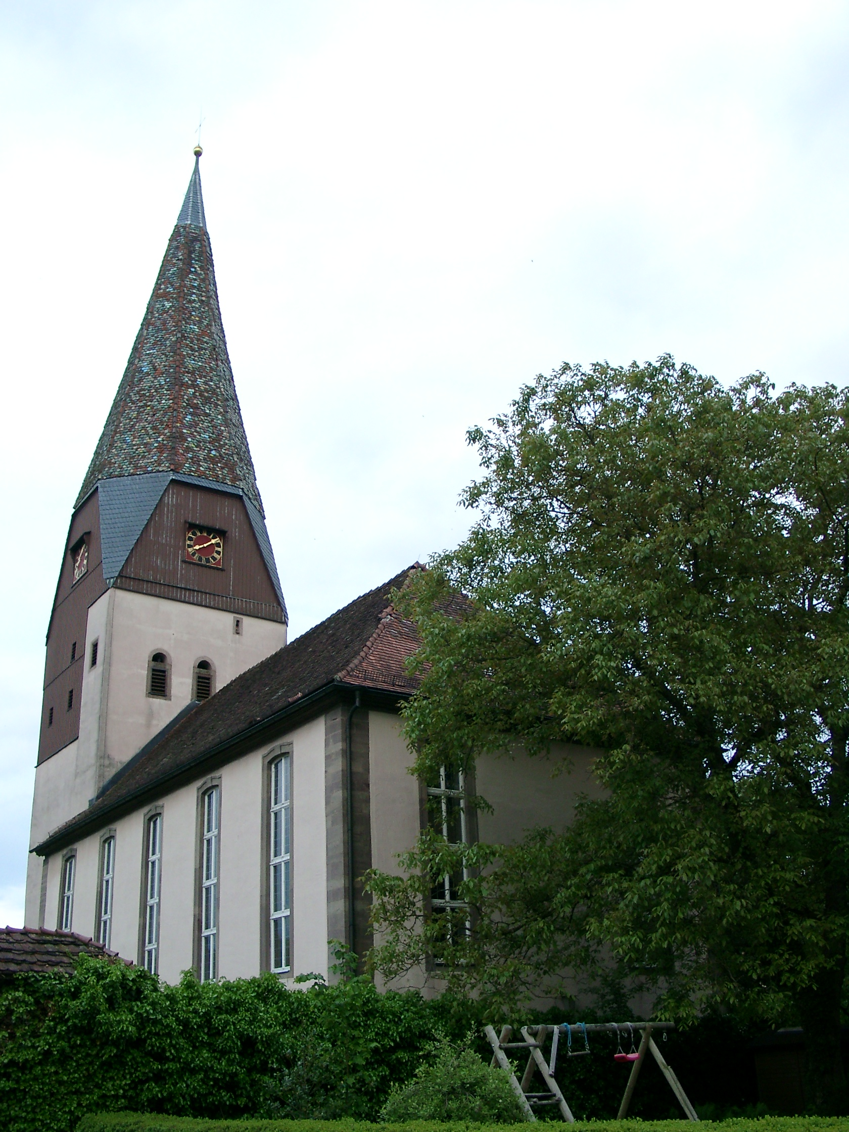 Untermünkheim, Pfarrkirche